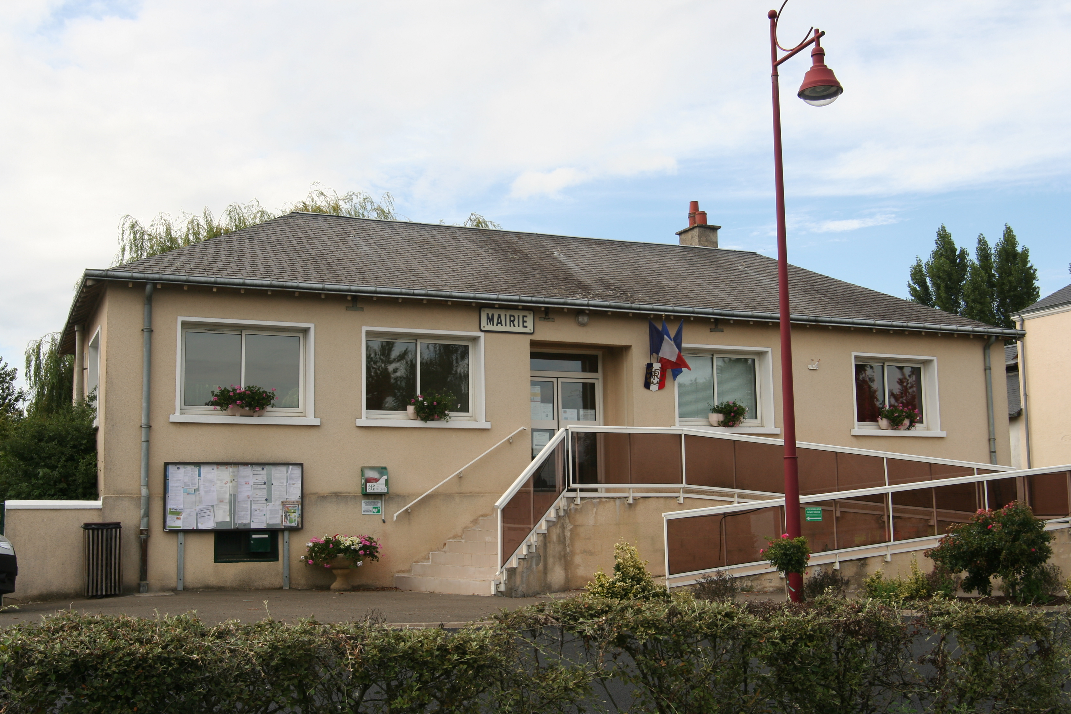 Mairie de Rouperroux-le-Coquet.